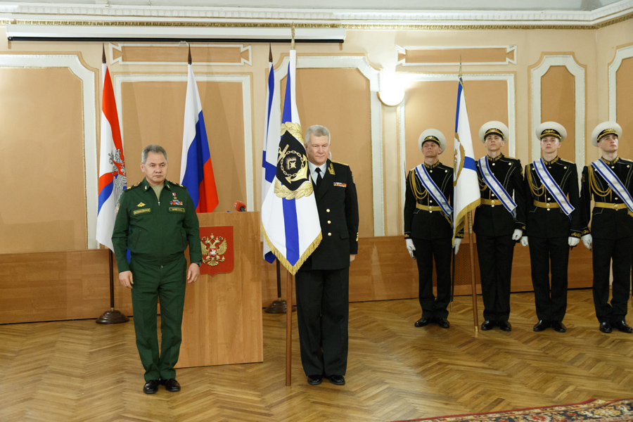 Министр обороны России генерал армии Сергей Шойгу вручил вице-адмиралу Николаю Евменову штандарт командующего Северным флотом